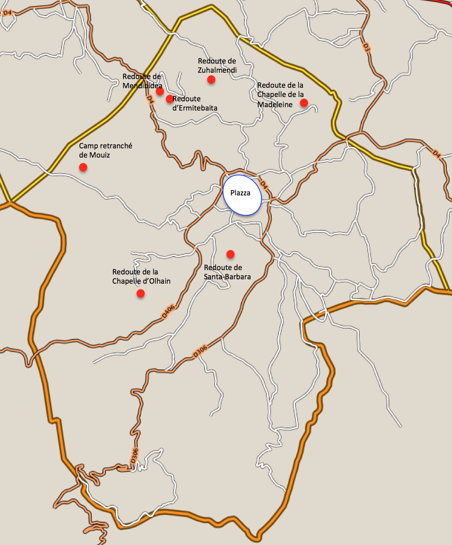 Les redoutes militaires de Sare